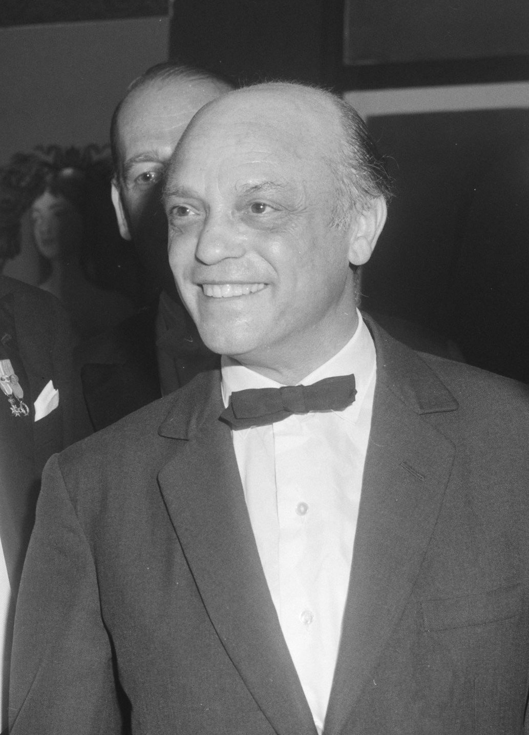 Hare Majesteit koningin Juliana heeft een gala-avond bijgewoond van Nederlandse Boekenweek in de RAI, Hare Majesteit in gesprek met Manuel van Loggem en Bertus Aafjes.